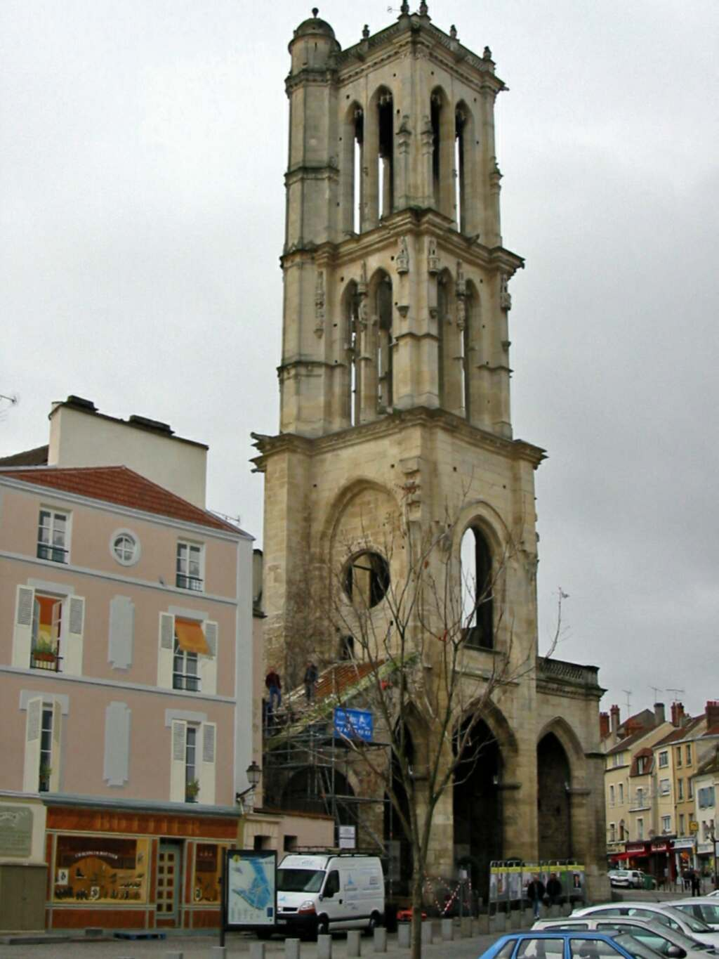 Tour Saint-Maclou - Mantes-la-Jolie (Yvelines) Photo personnelle; novembre 2004